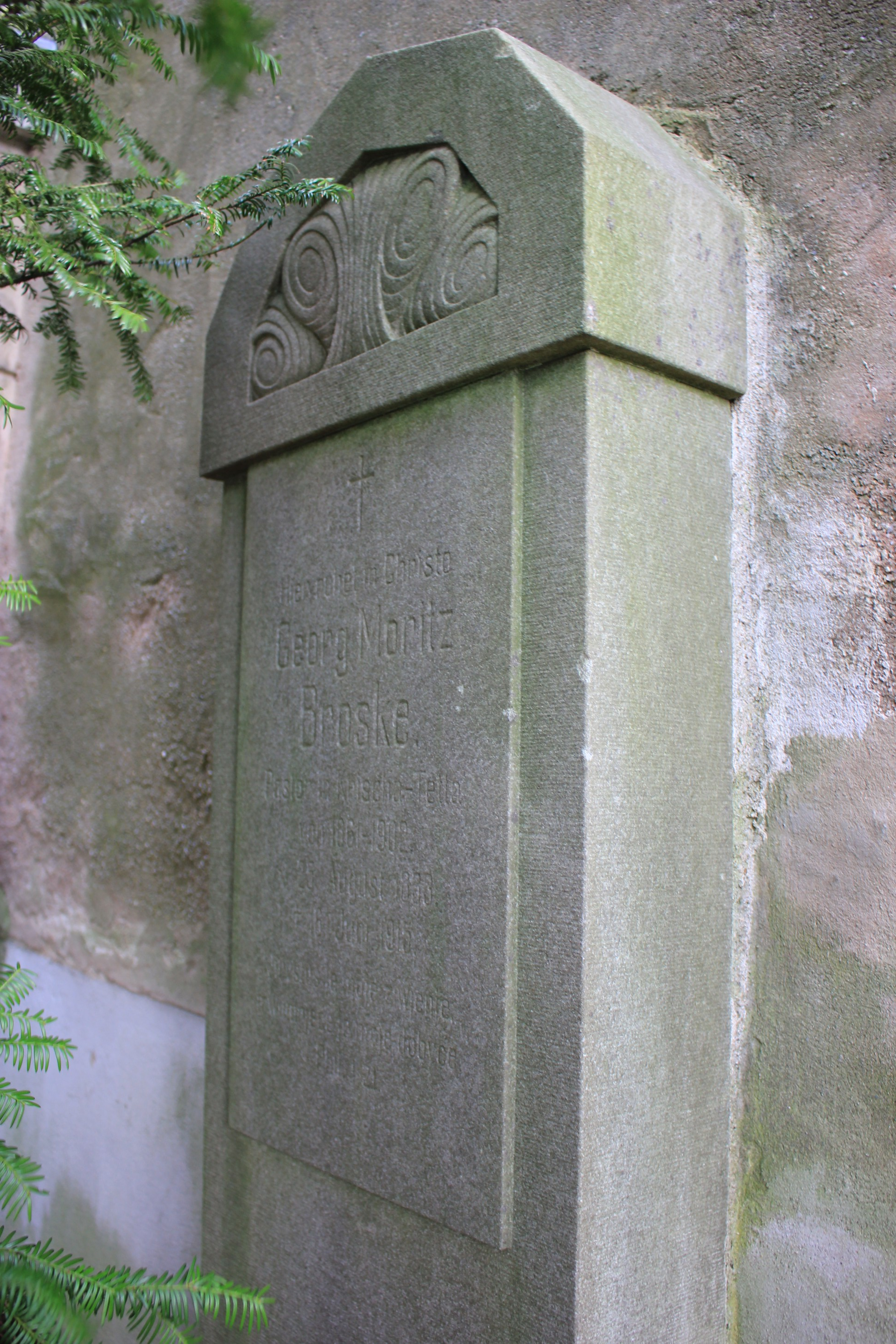 Hornjoserbsce: Narowny kamjeń Jurja Bróska w Ćetowje.